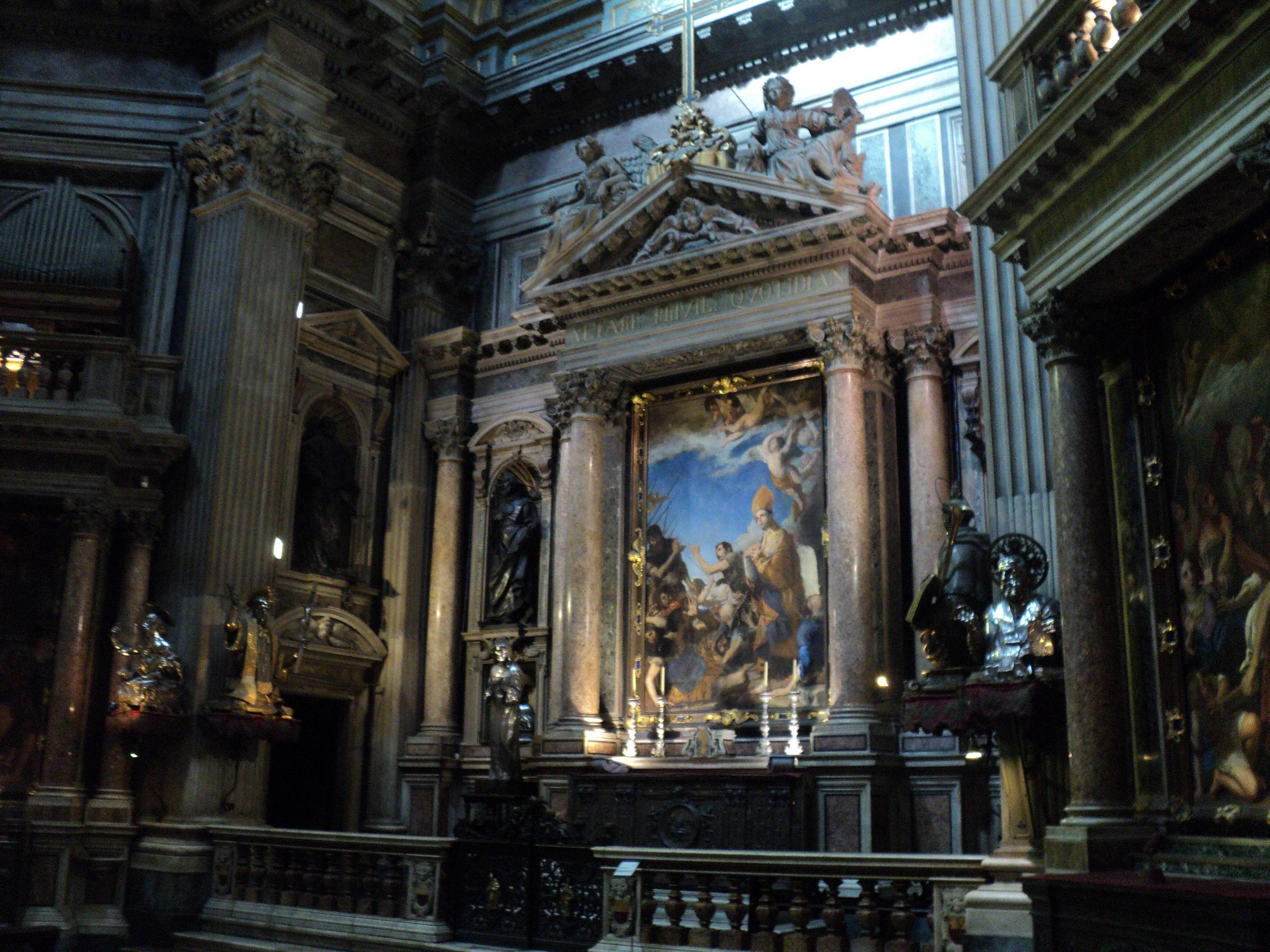 Duomo di Napoli - Reale Cappella del Tesoro di San Gennaro (Napoli) - Altare maggiore di destra